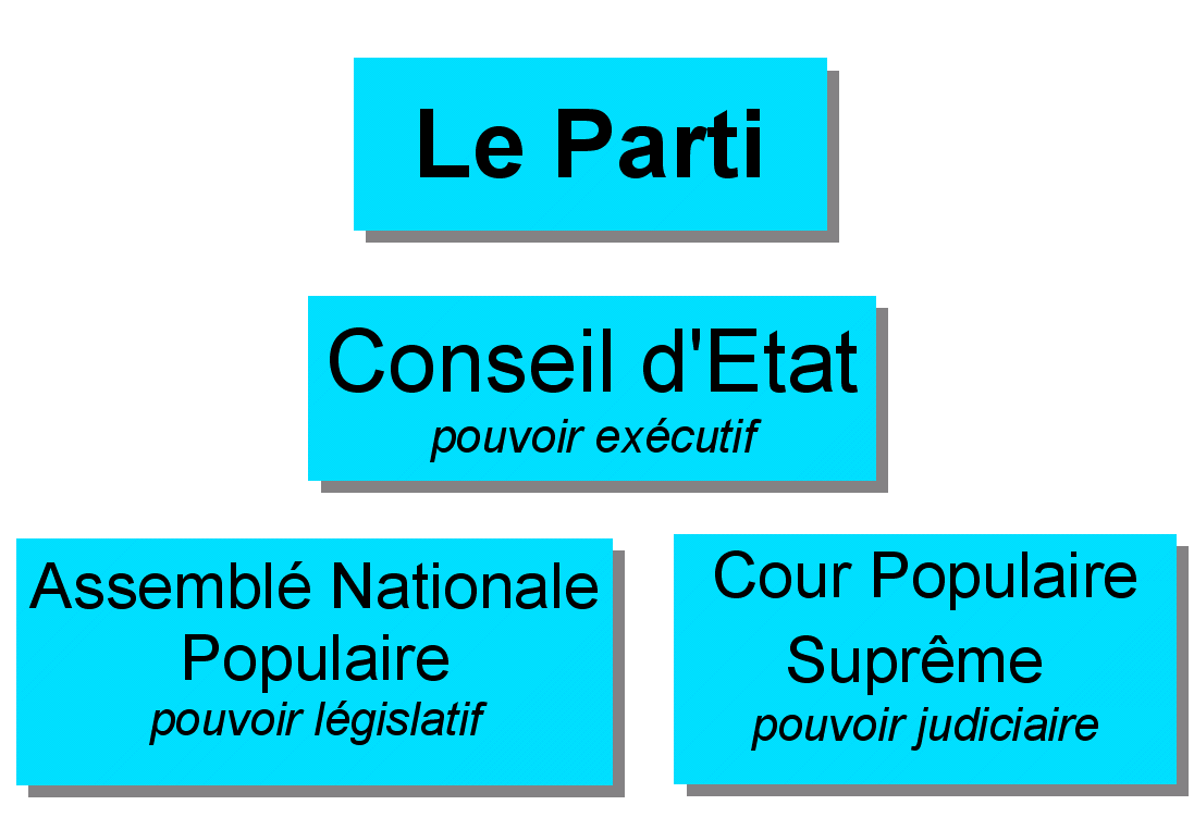 RPC Schéma de la relation entre les pouvoirs en pratique